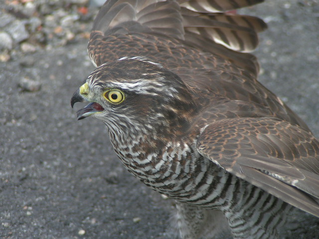 Accipiter nisus nisus Giovane esemplare di Sparviero